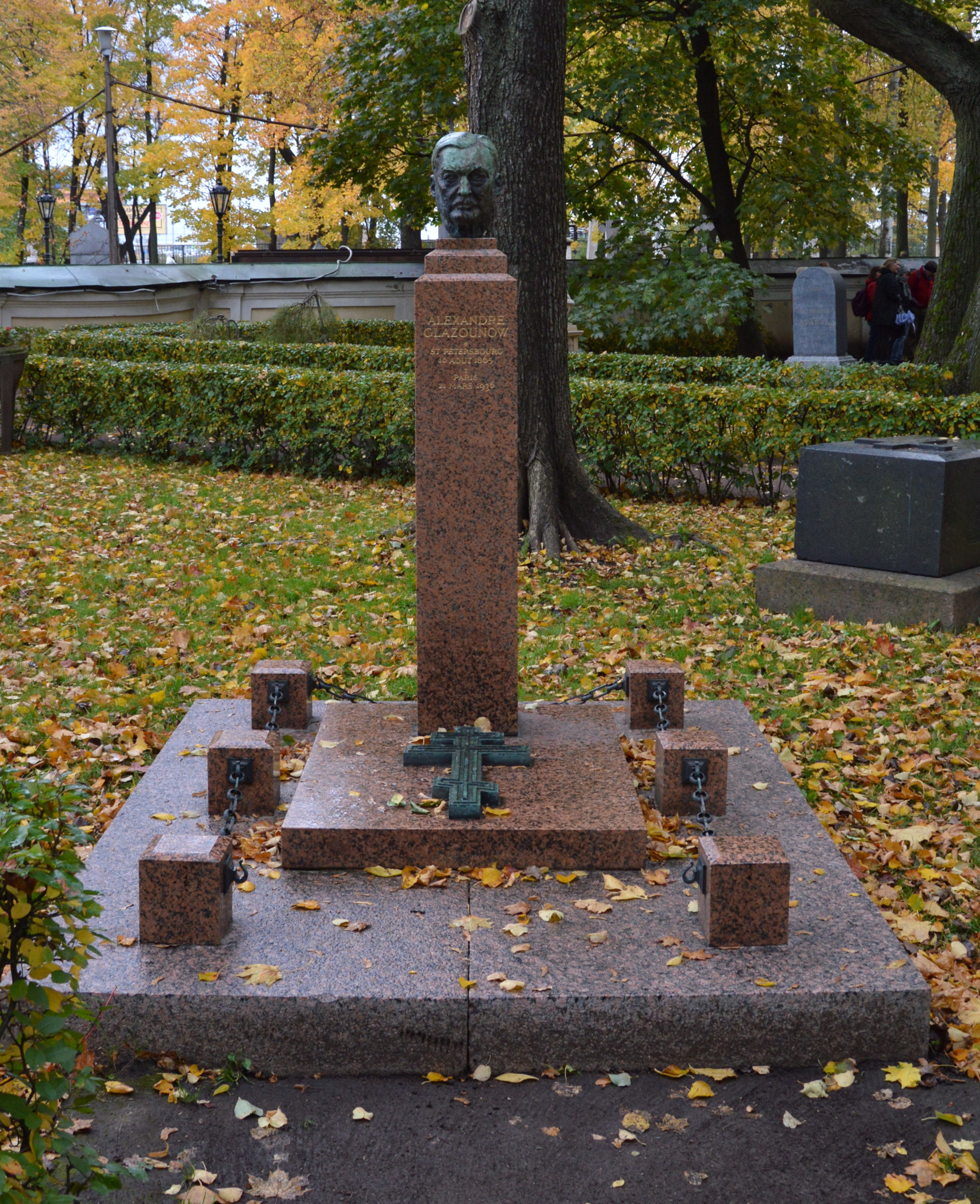 Alexandre Glazounow Grabmal in Sankt Petersburg